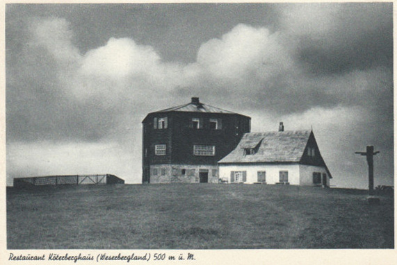 Das Köterberghaus auf dem Köterberg bei Lügde (westlich von Höxter) von 1929 mit Anbau von ca.1950. Vom 7. Juni bis 2. Oktober 1929 wurde das Köterberghaus in Form einer schlesischen Baude errichtet. Dabei wurde das Fundament aus den Steinen des Turms von 1893 gebaut, der bei Baubeginn gesprengt wurde.